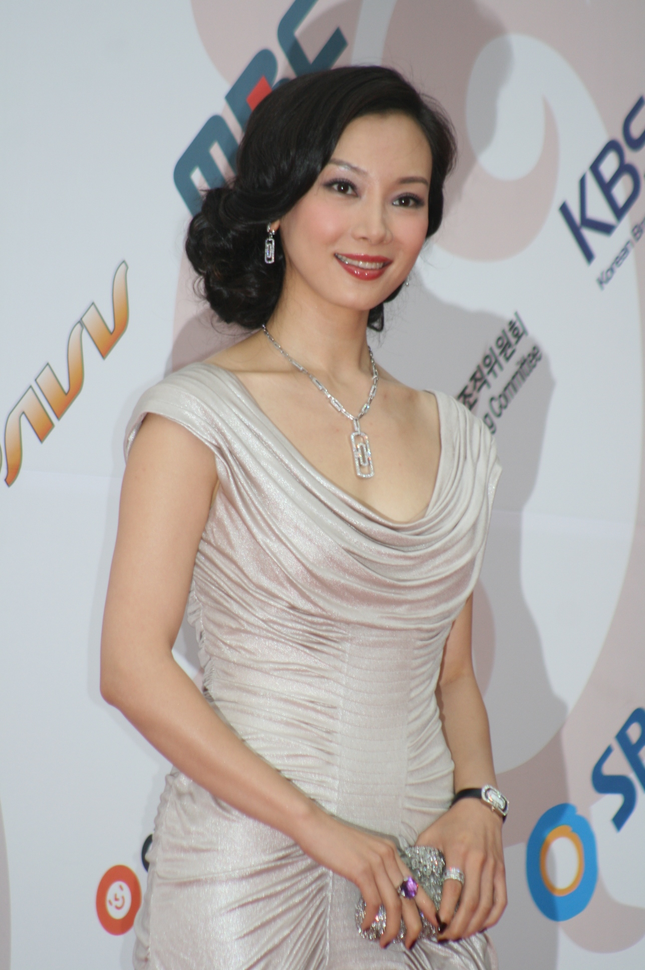 2009 서울 드라마 어워드